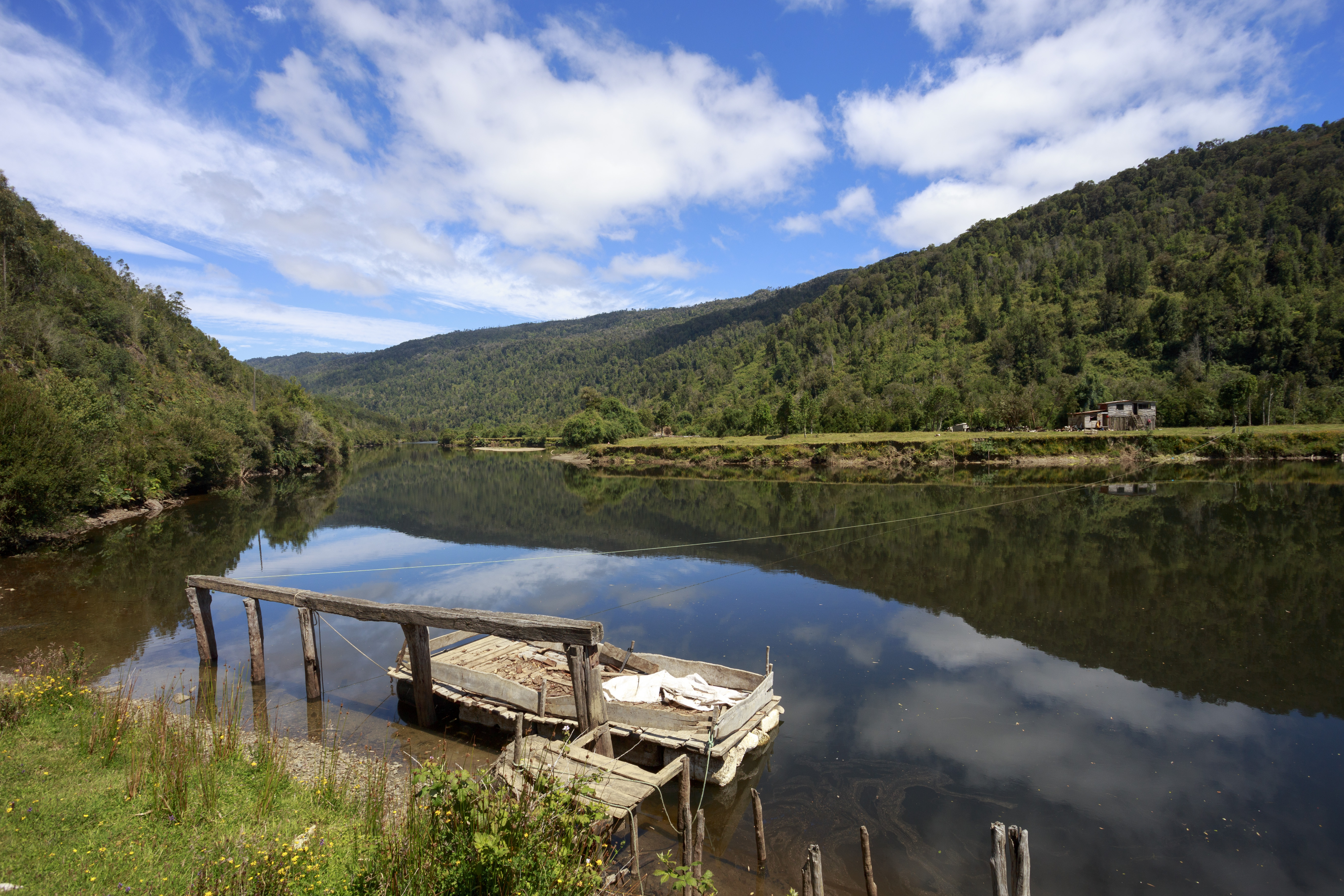 los muermos - fresia Río Llico